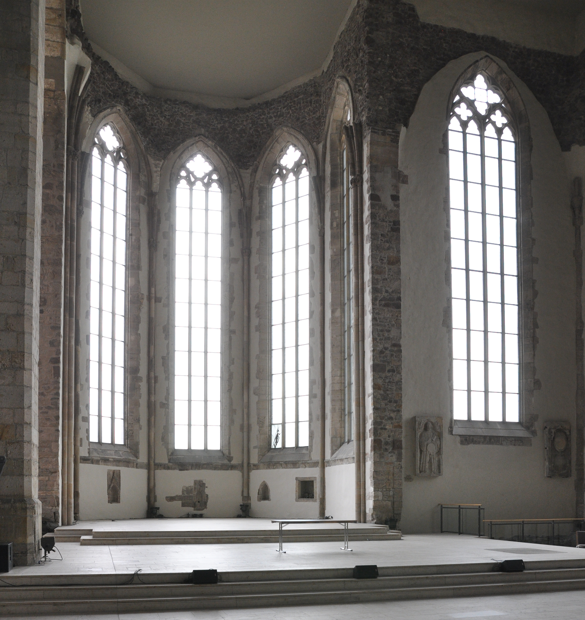 Innenraum, Chor nach Südosten